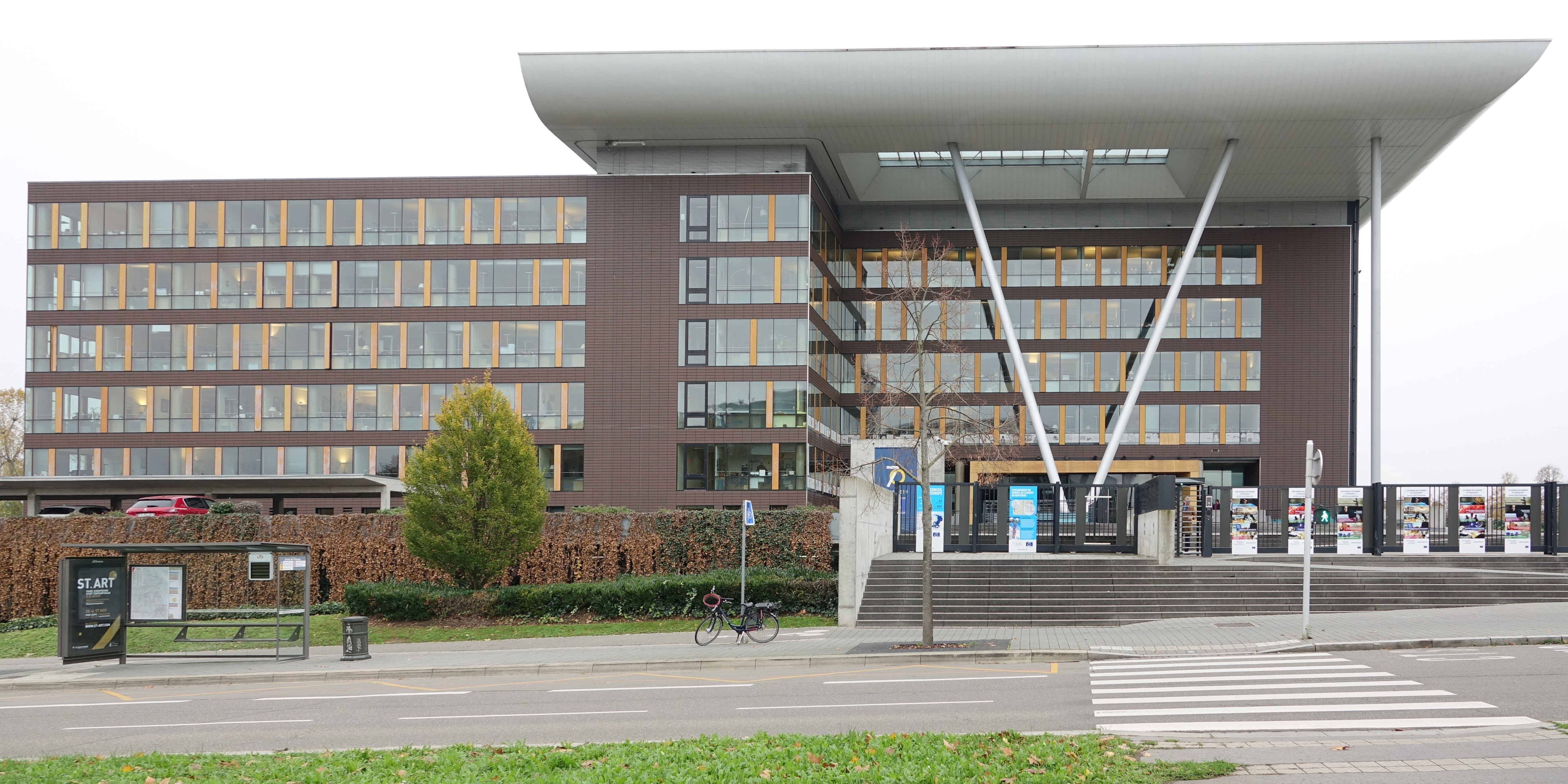 Bâtiment Agora du Conseil de l'Europe à Strasbourg (Bas-Rhin, France).